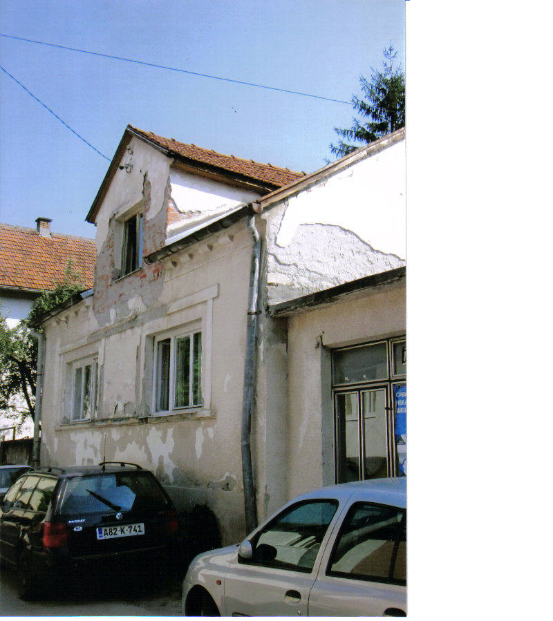 Српски (ћирилица): Kuća učitelja Popovića u Novoj mahali